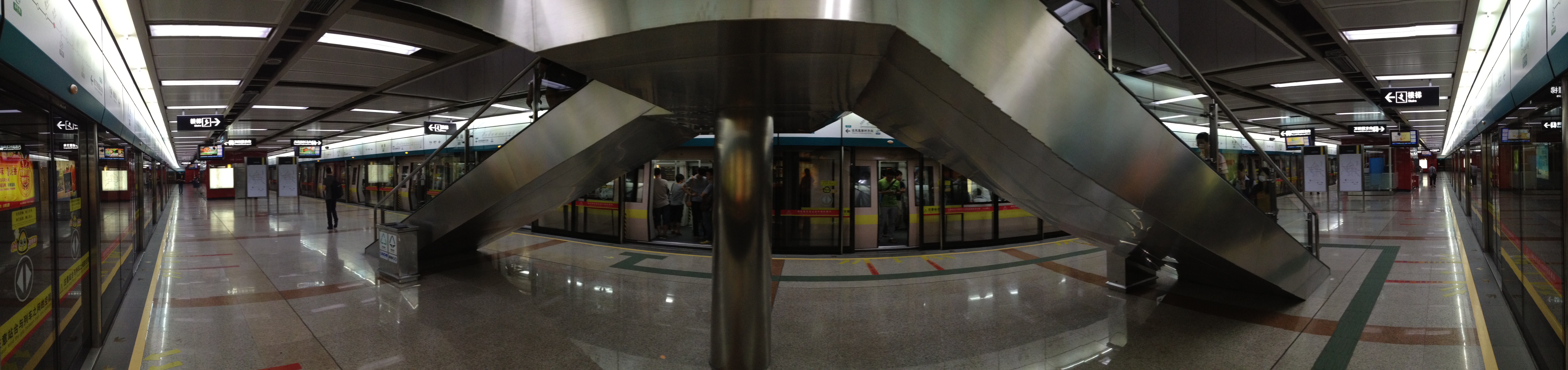 广州地铁8号线赤岗站月台全景图